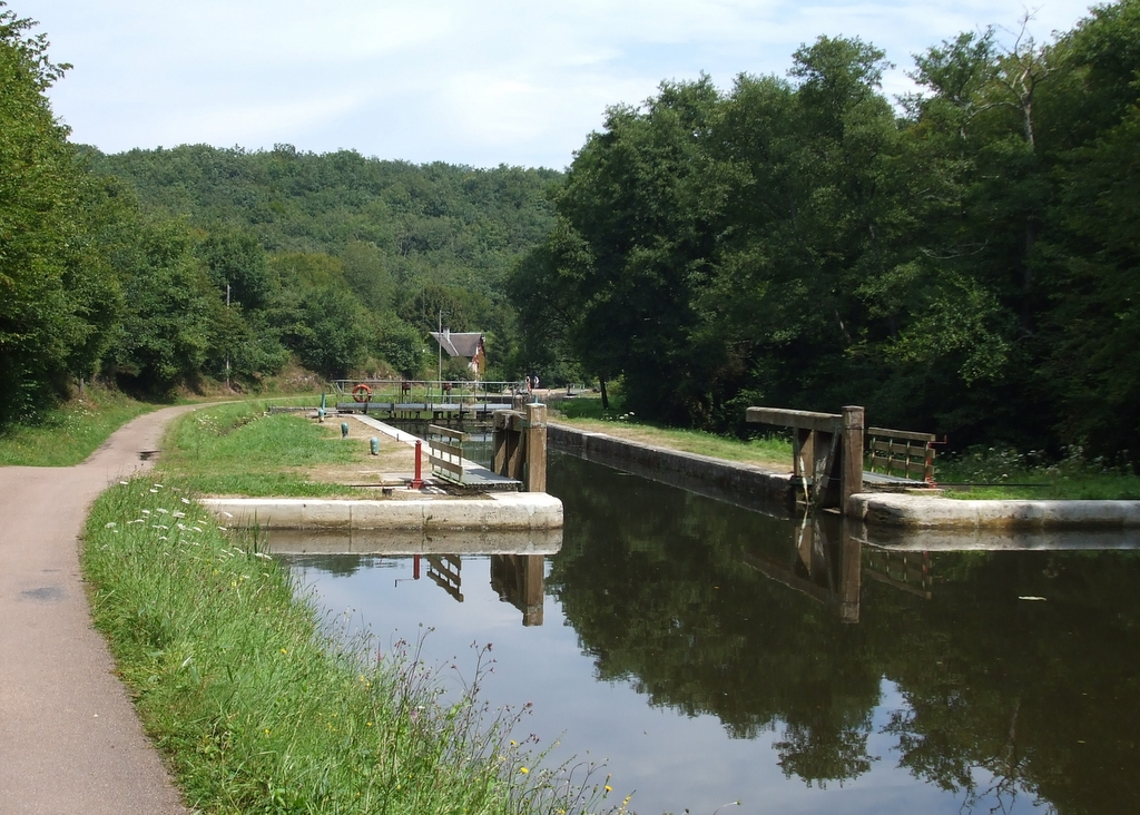 Une des 17 écluses de la Collancelle sur le canal du Nivernais